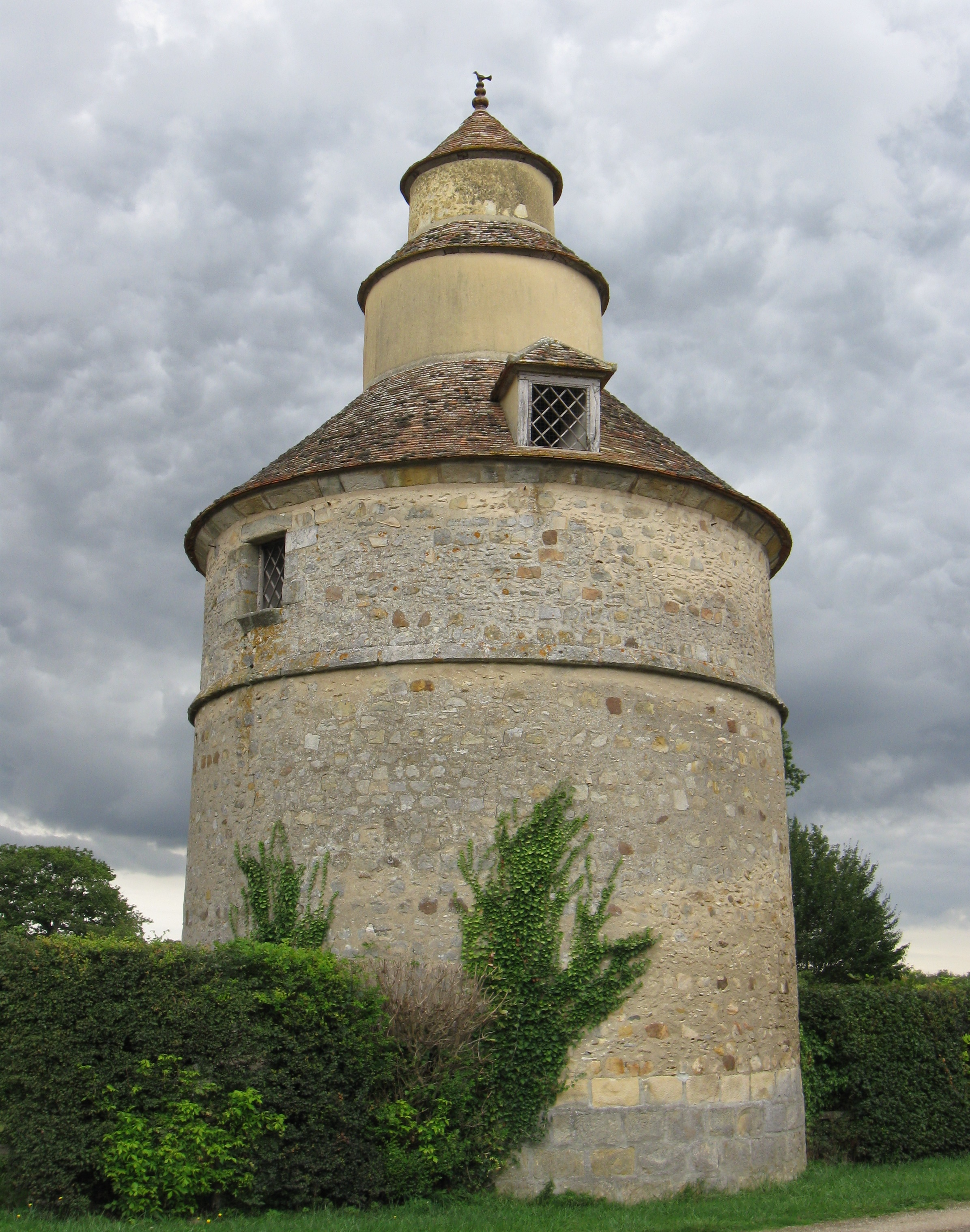 Pigeonnier de l'ancien château de Châtillon-la-Borde. (la Borde, Seine-et-Marne, région Île-de-France).